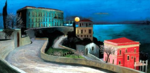 Hungarian: Holdtölte Taorminábanlabel QS:Lhu,"Holdtölte Taorminában"